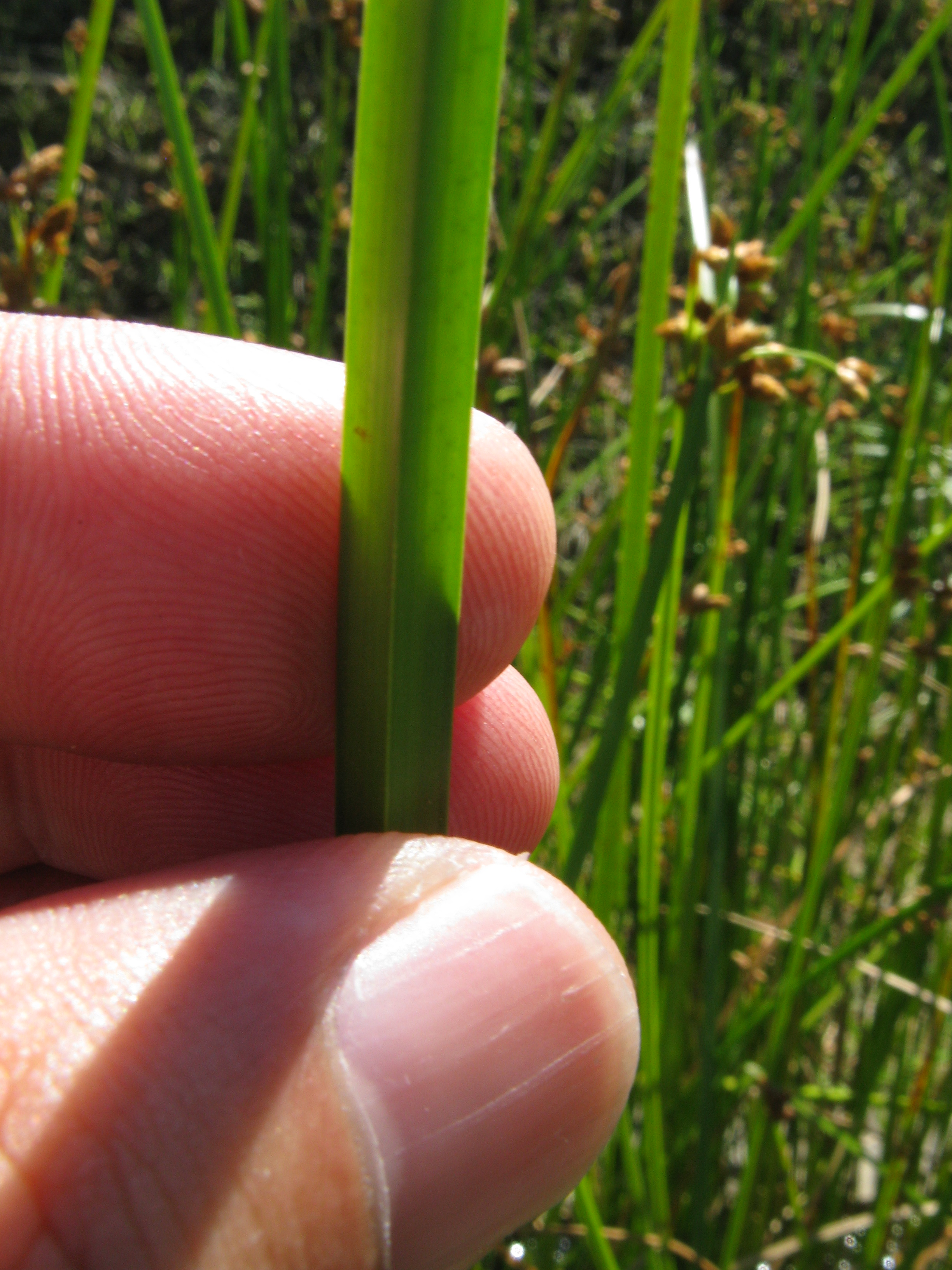 Scientific name Schoenoplectus triqueter